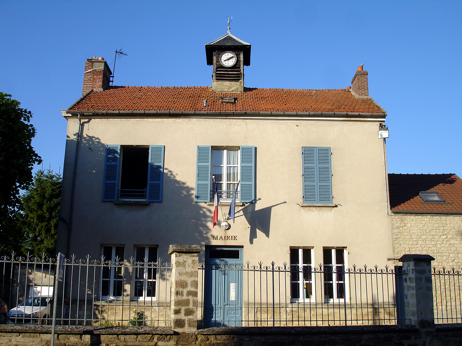 La mairie de Moussy, Val-d'Oise, France.